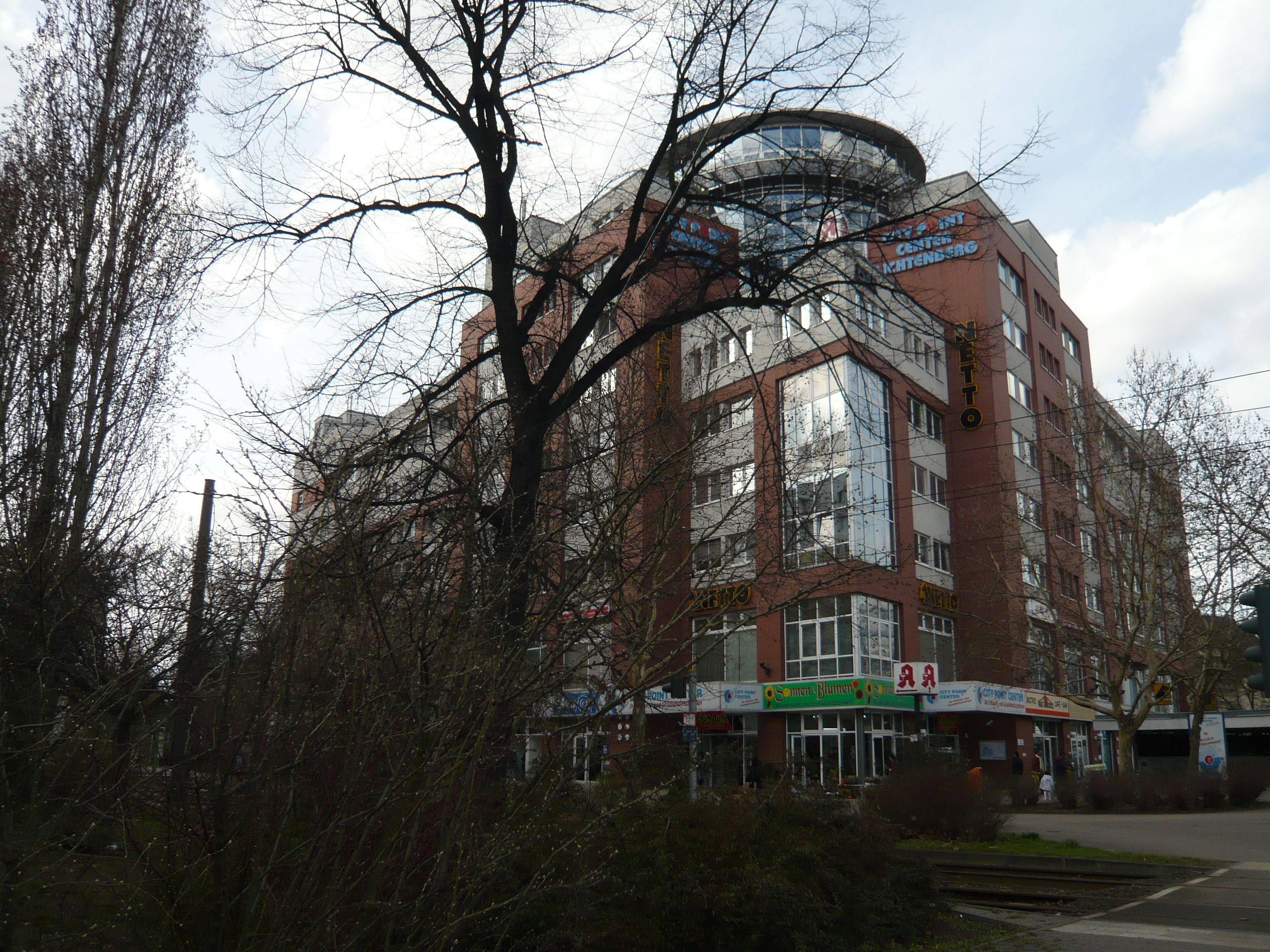 Straße im Ortsteil Berlin-Fennpfuhl: Bürohaus City Point Center am eh. Roederplatz